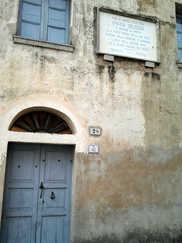 Rojstna hiša v Nuoru